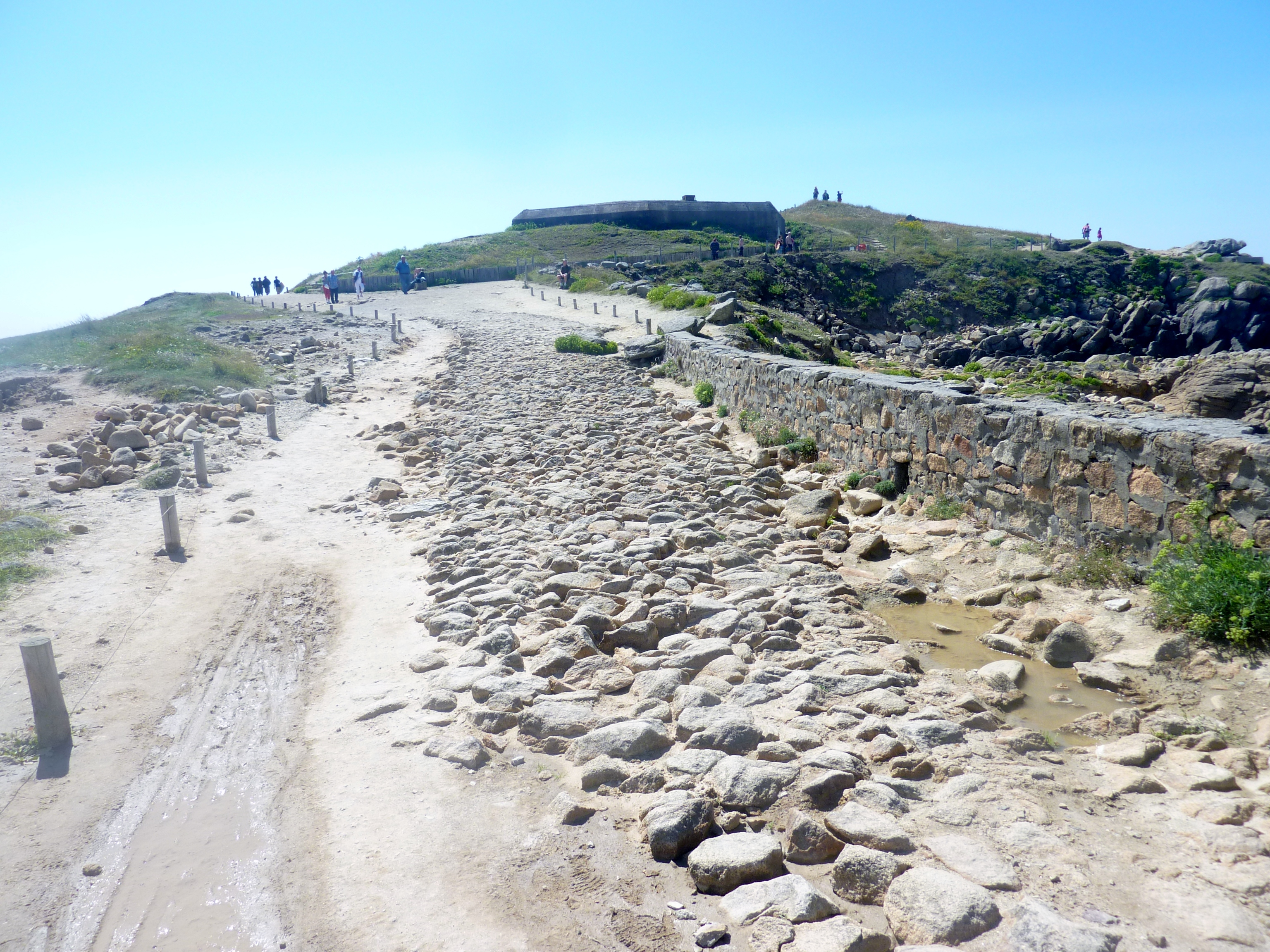 L'ancien chemin pavé menant à la Pointe de la Torche, dont le tumulus est visible à l'arrière-plan